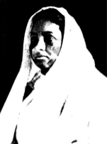 Portrait of Pandita Ramabai